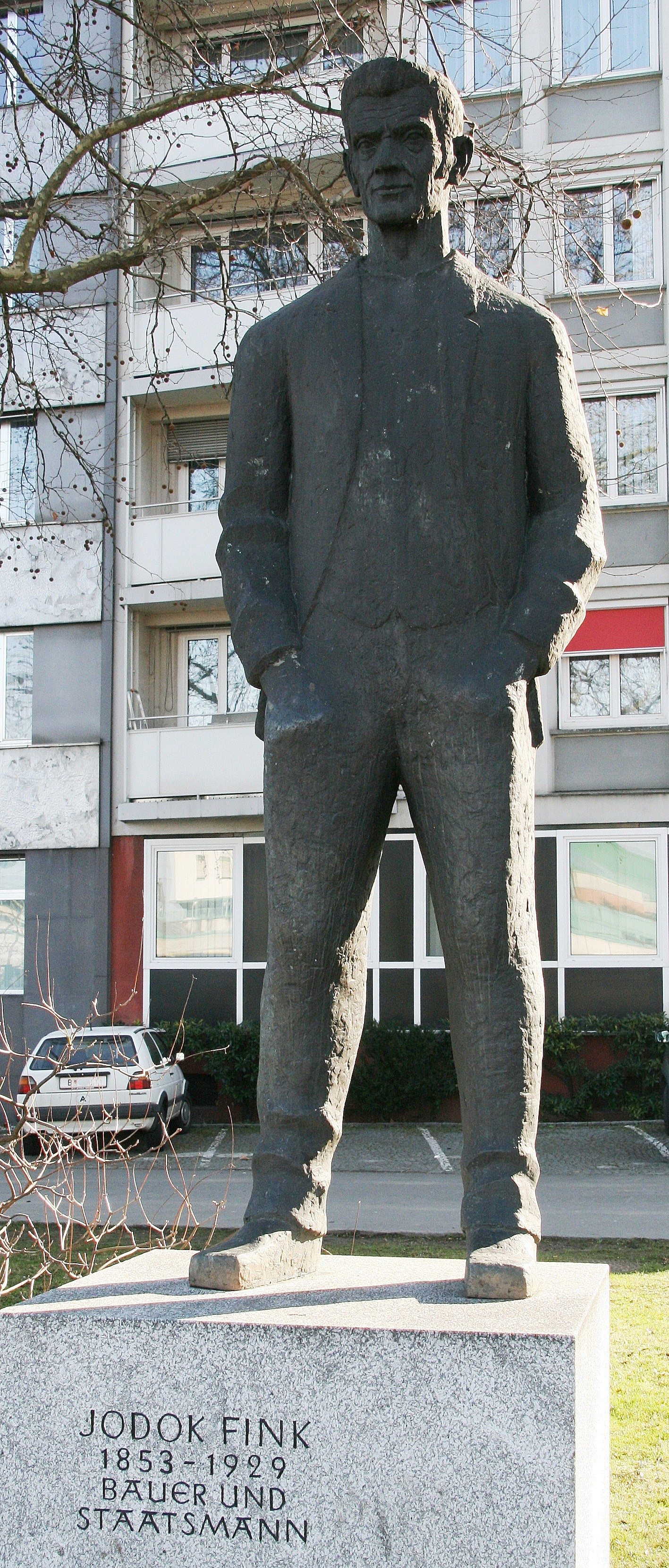 aus dem DEHIO Vorarlberg 1983: JODOK-FINK-DENKMAL, Bahnhofstrasse 35. Ganzfigurige Portraitplastik des Politikers Jodok Fink (Vizekanzler 1919/20), 1957 von Emil Gehrer.*** geboren 1853, gestorben 1929. *** Bregenz in Vorarlberg.